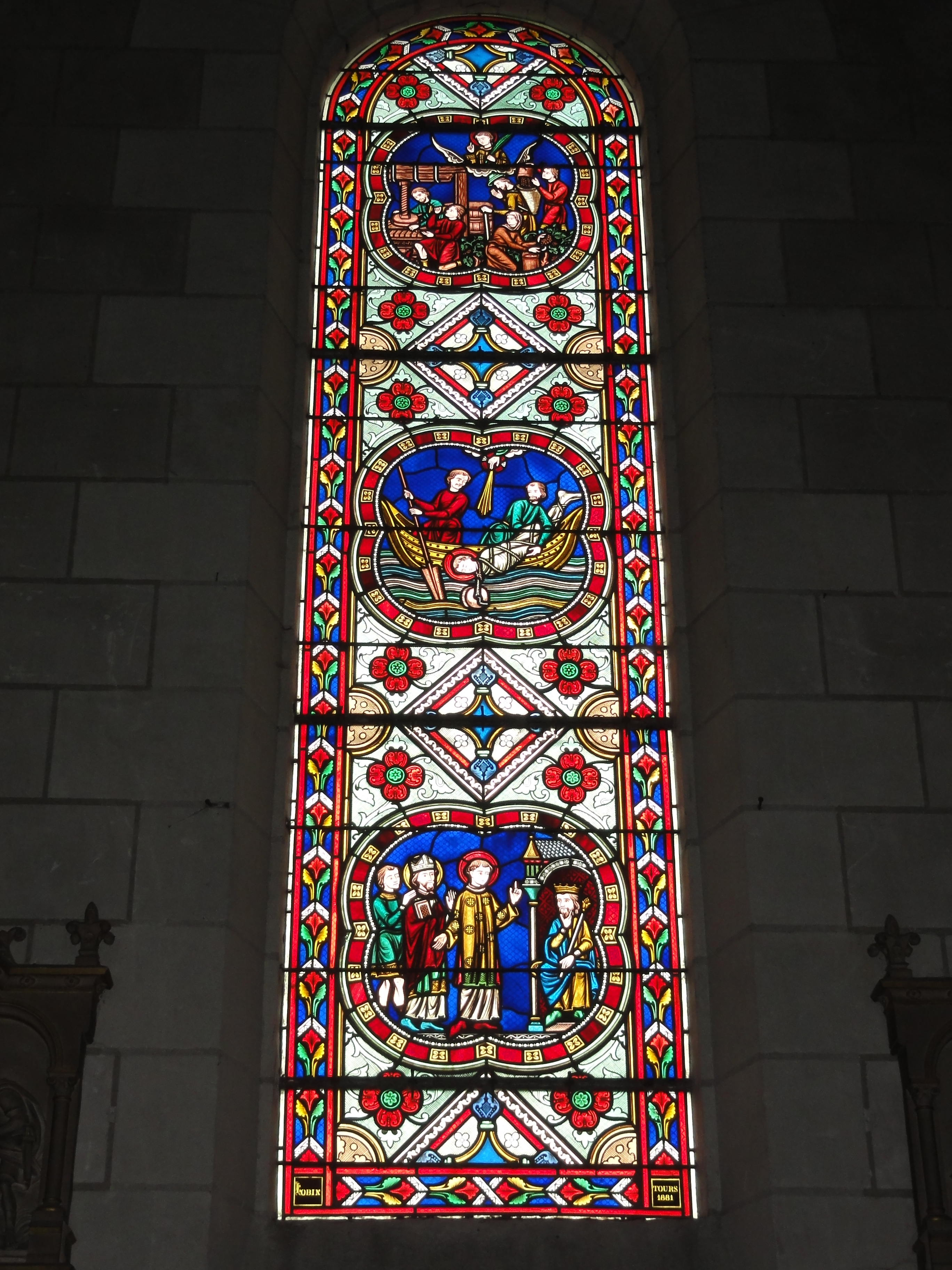 Veigné (Indre-et-Loire) église, vitrail 08